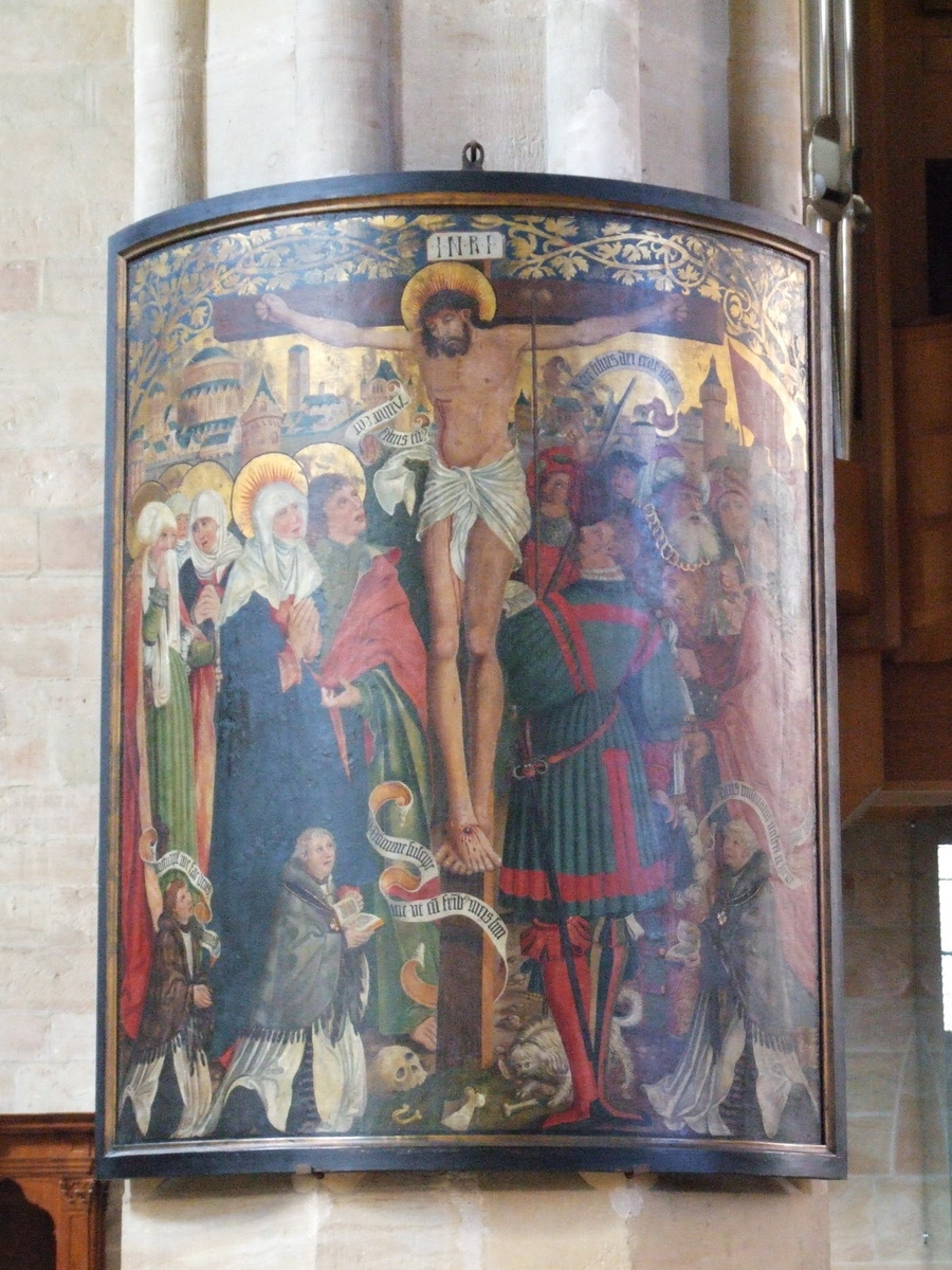 Erfurter Dom, Erfurt, Germany